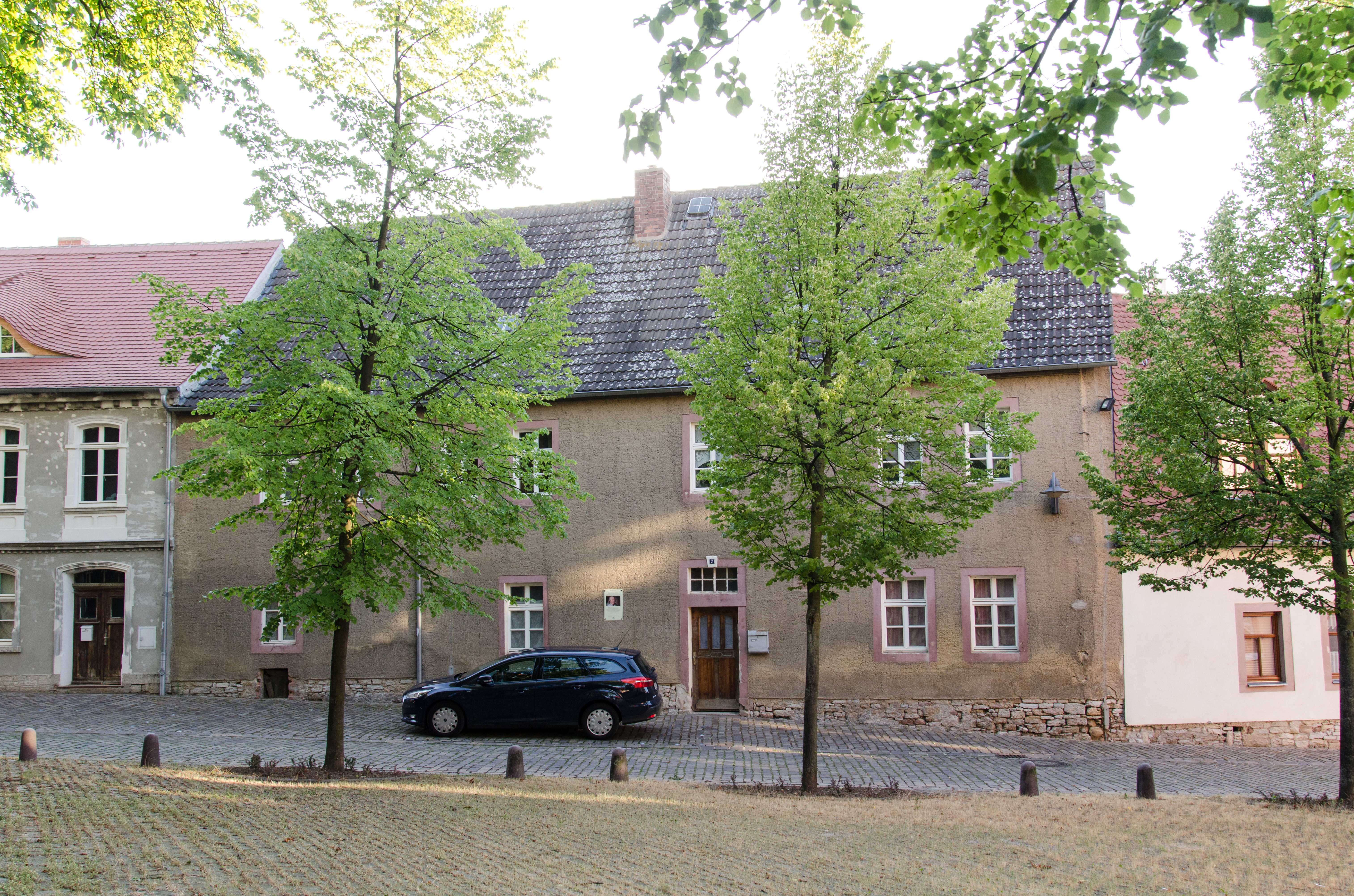 Querfurt, Kirchplan 7